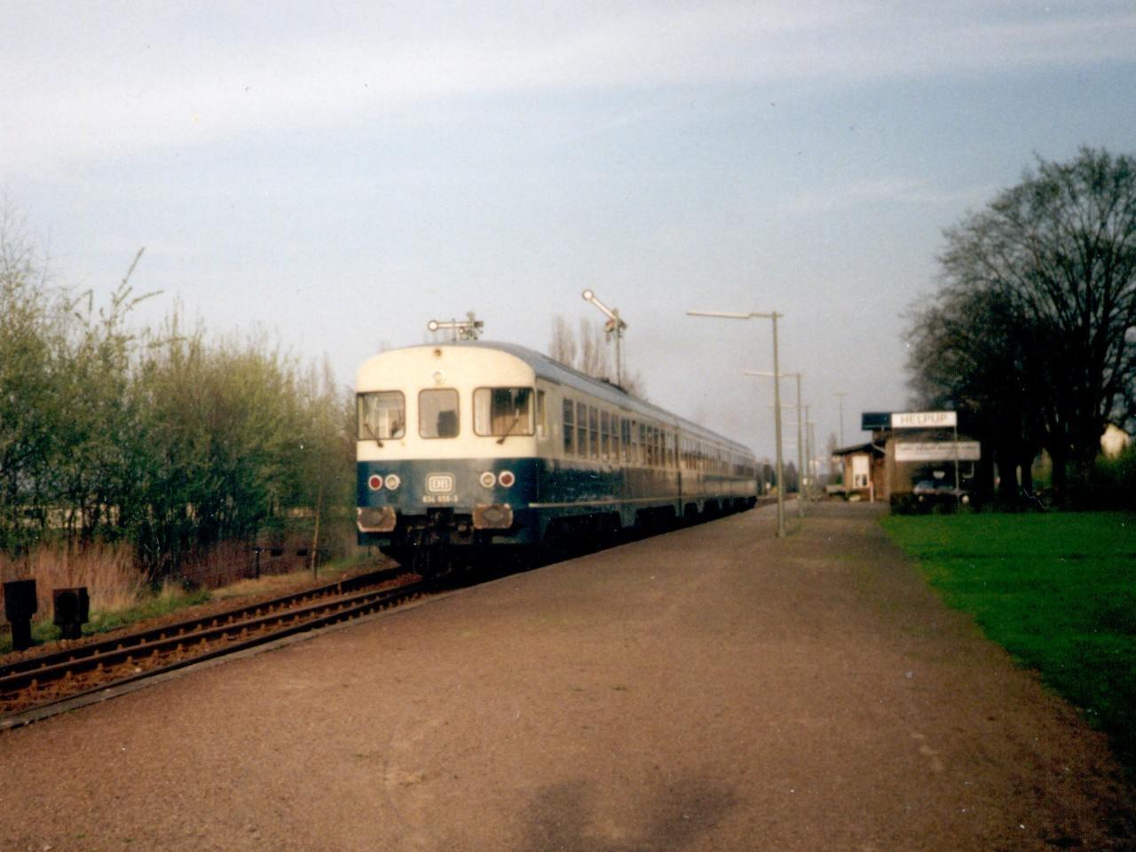 634 656-3 verlässt nach erfolgter Zugkreuzung den Bahnhof Helpup auf dem Weg von Lemgo nach Bielefeld